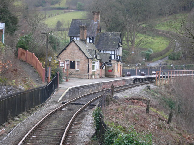 Berwyn railway station Original description: Berwyn station